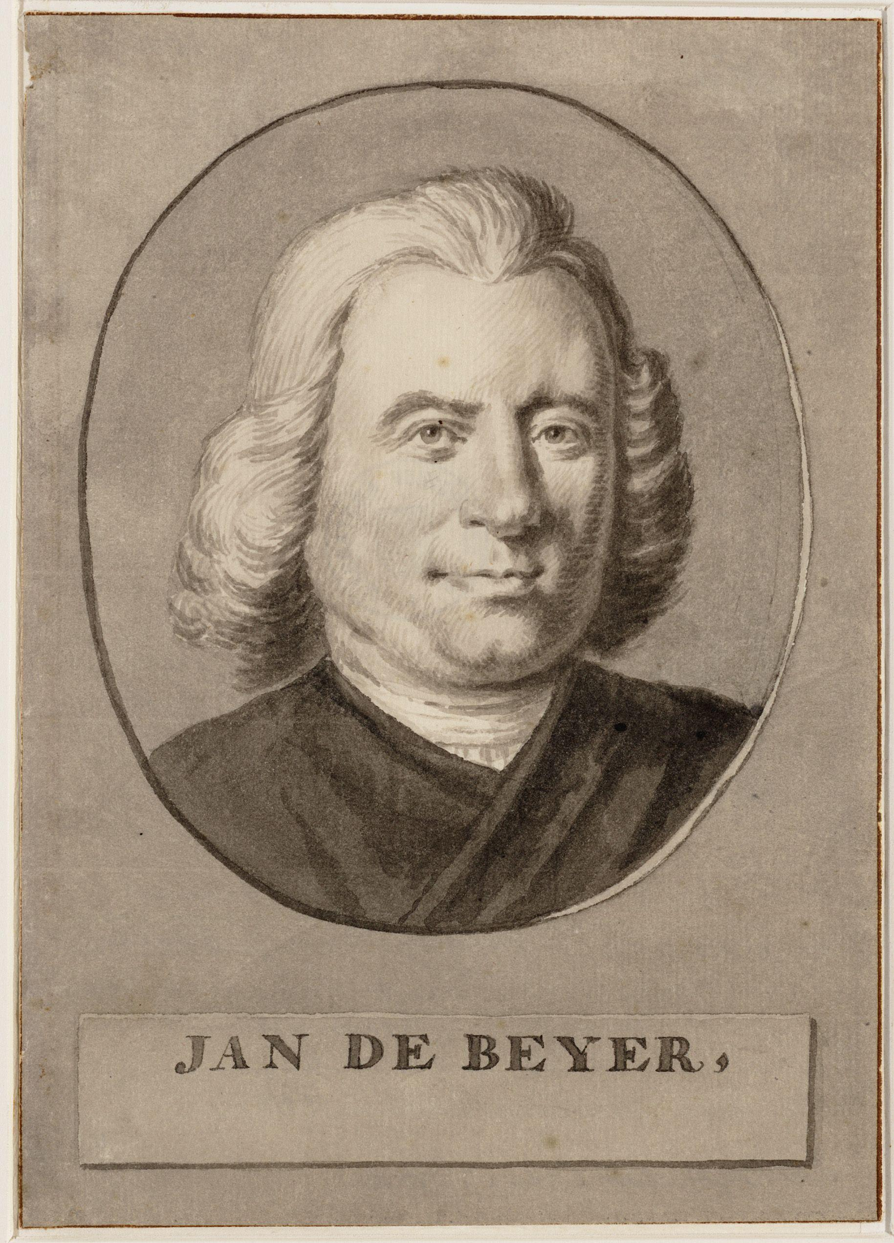 Jan de Beijer